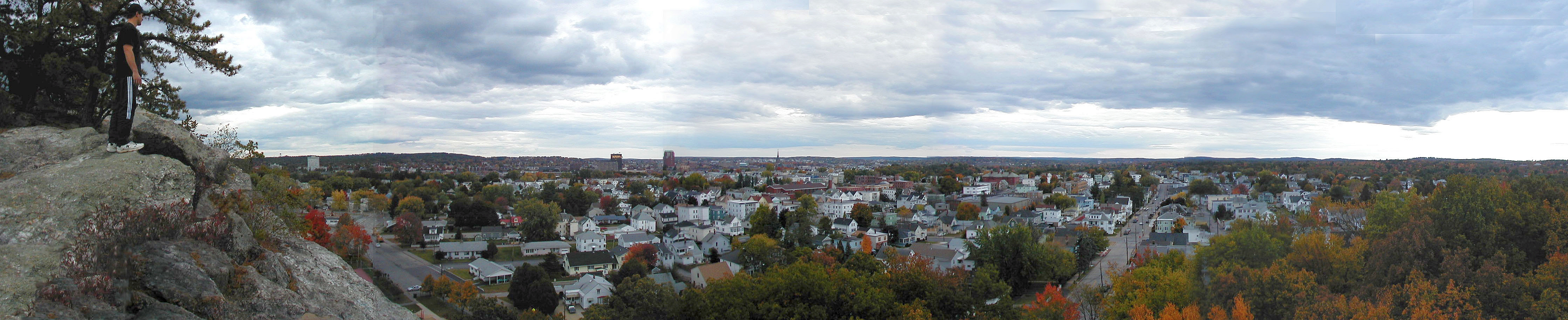 Mike Spenard